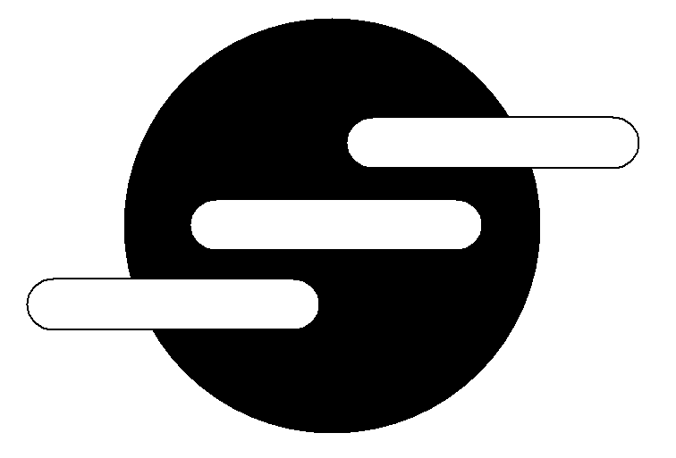 Firmenlogo der ehemaligen britischen Elektronik-Firma Ferranti